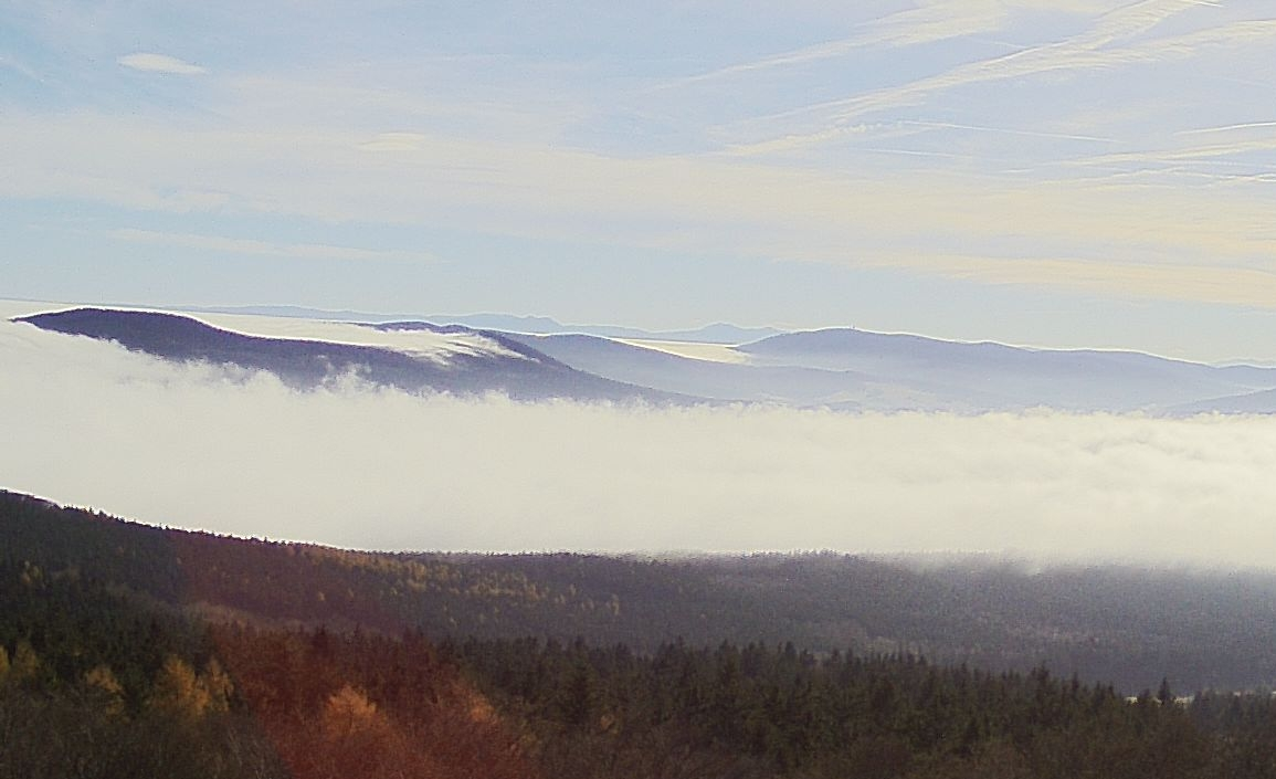 Blick nach Südosten zum Bayerischen Wald mit Kaltluftsee im Böhmischen Kessel